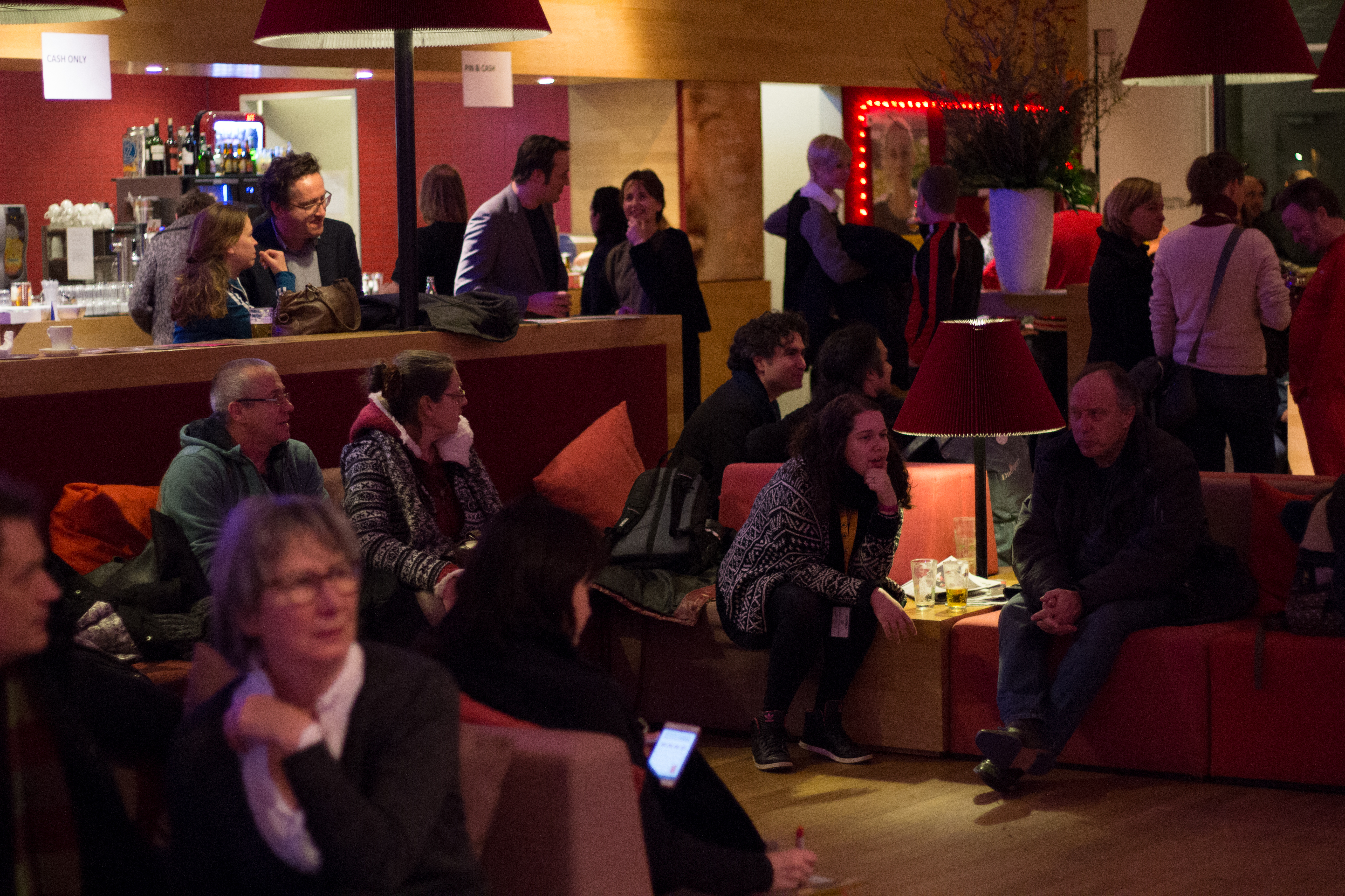 Sfeerbeelden van het IFFR 2015